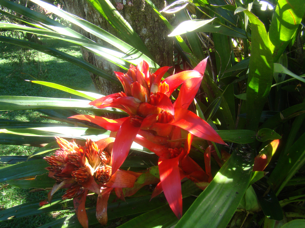 Guzmania wittmackii